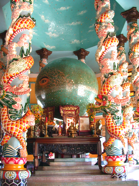 Cao dai temple, Vietnam